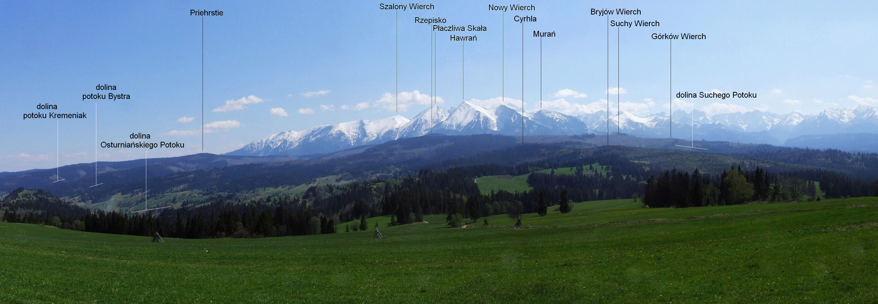 Widok z Łapszanki (Wyżny Koniec powyżej Przełęczy nad Łapszanką)